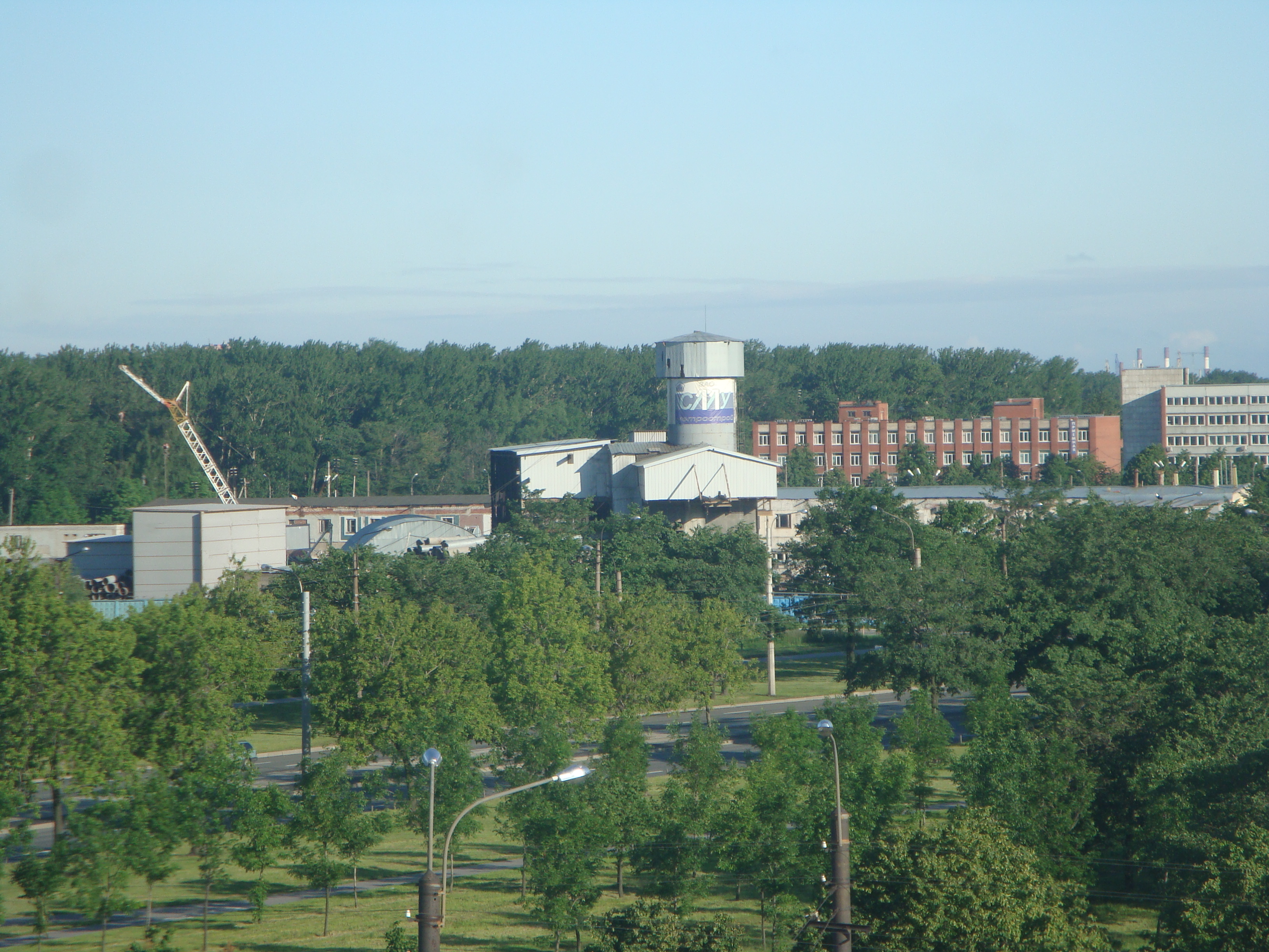 Общий вид стройплощадки станции Бухарестская в Санкт-Петербурге